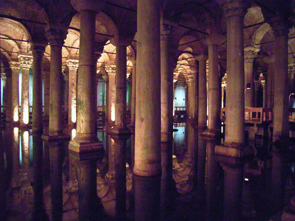 Römische Zisterne, Istanbul